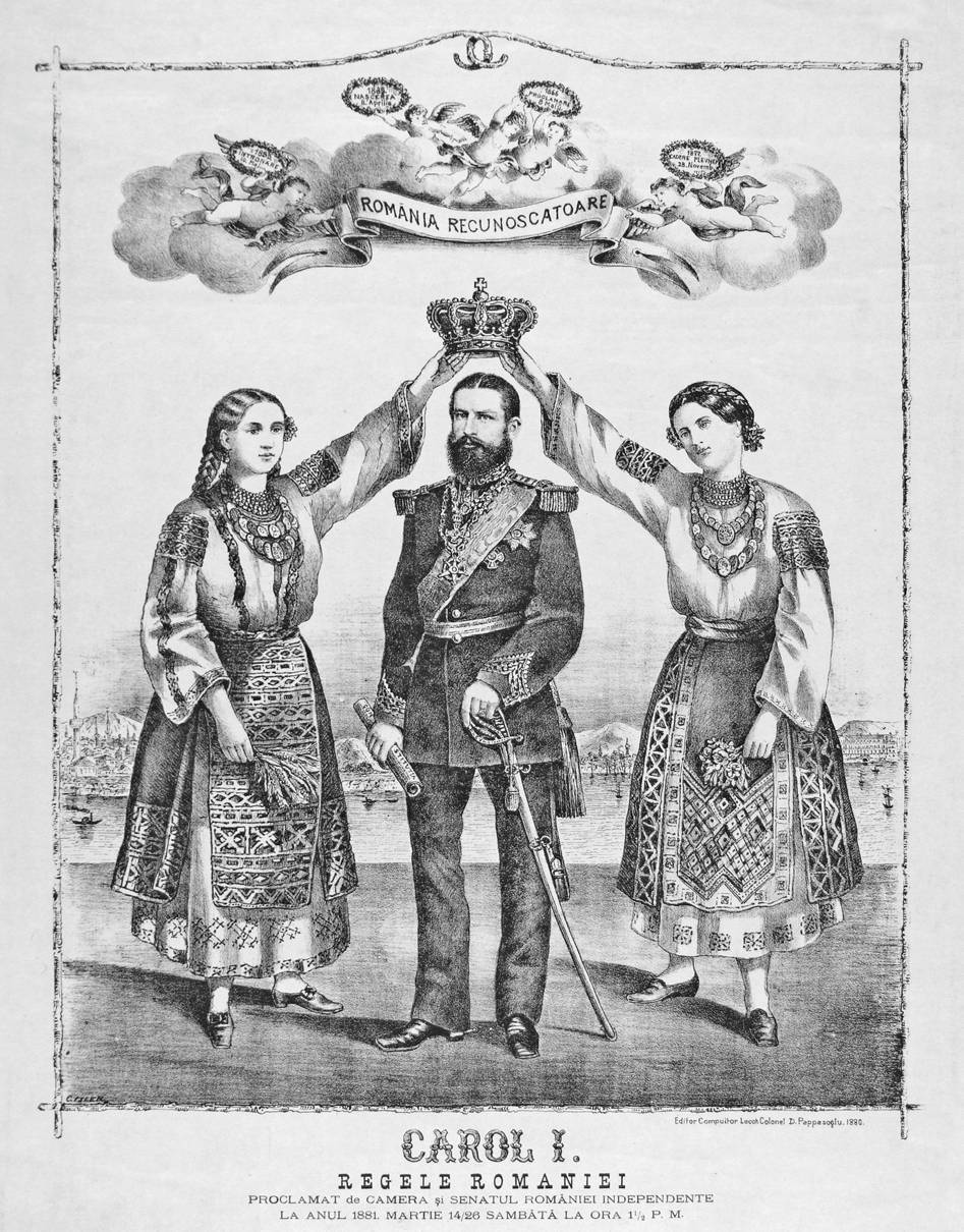 Carol I - România Recunoscătoare